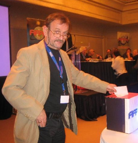 Marek Pięta na głosowaniu FIFPro w Barcelonie